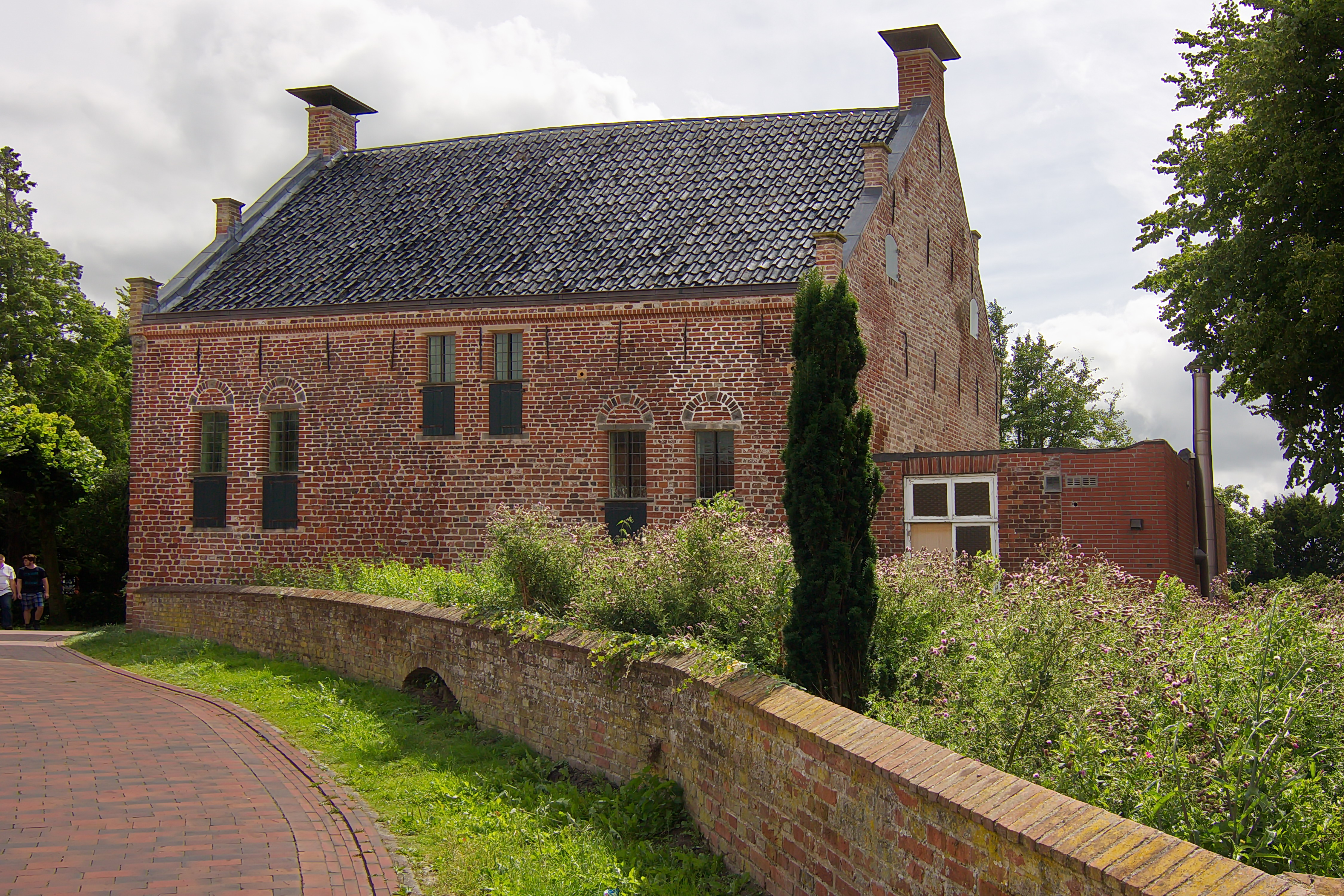 Steinhaus Greetsiel (Krummhörn), Niedersachsen, Deutschland